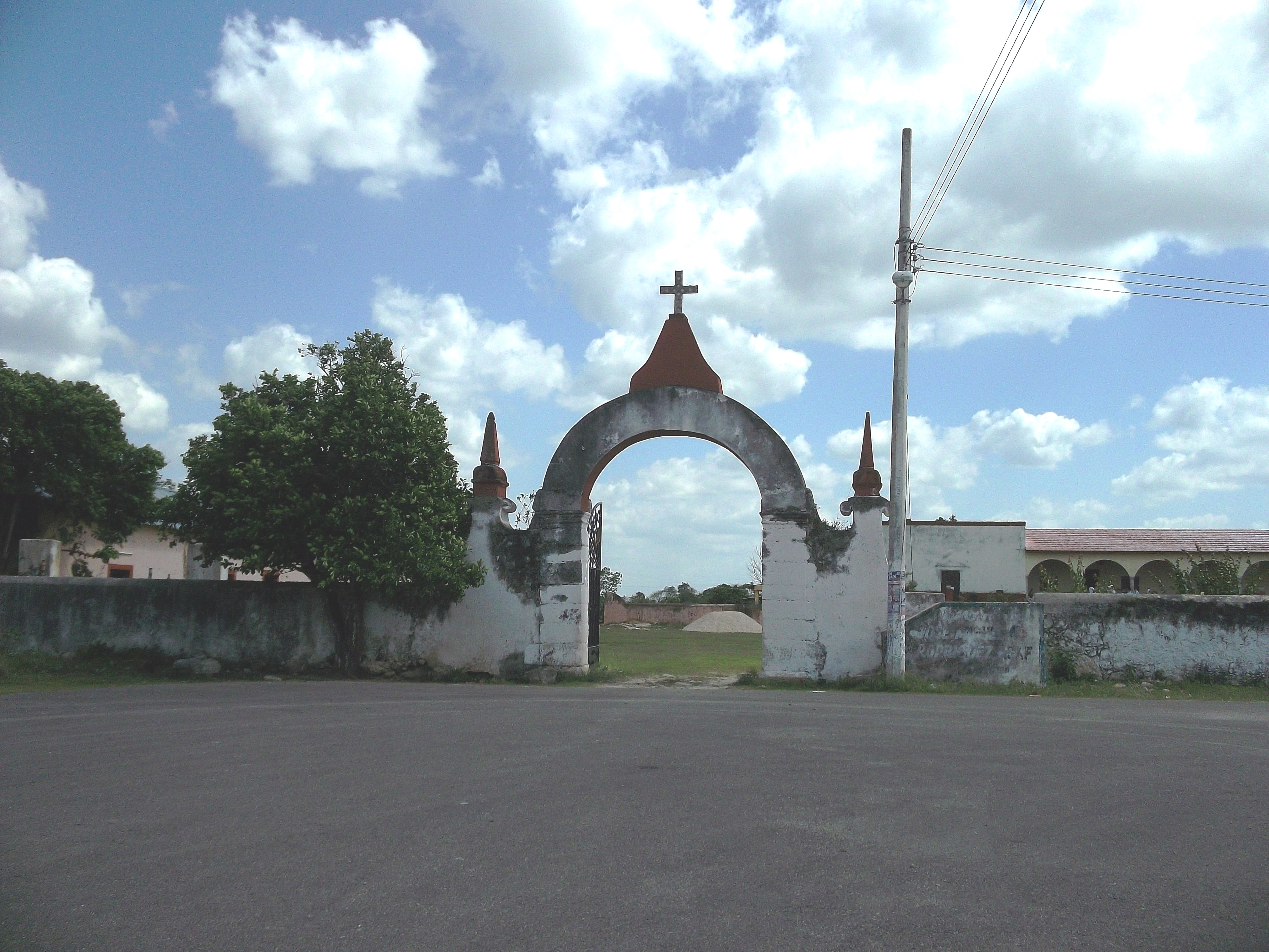 Arco de la hacienda de Hubilá, Yucatán.